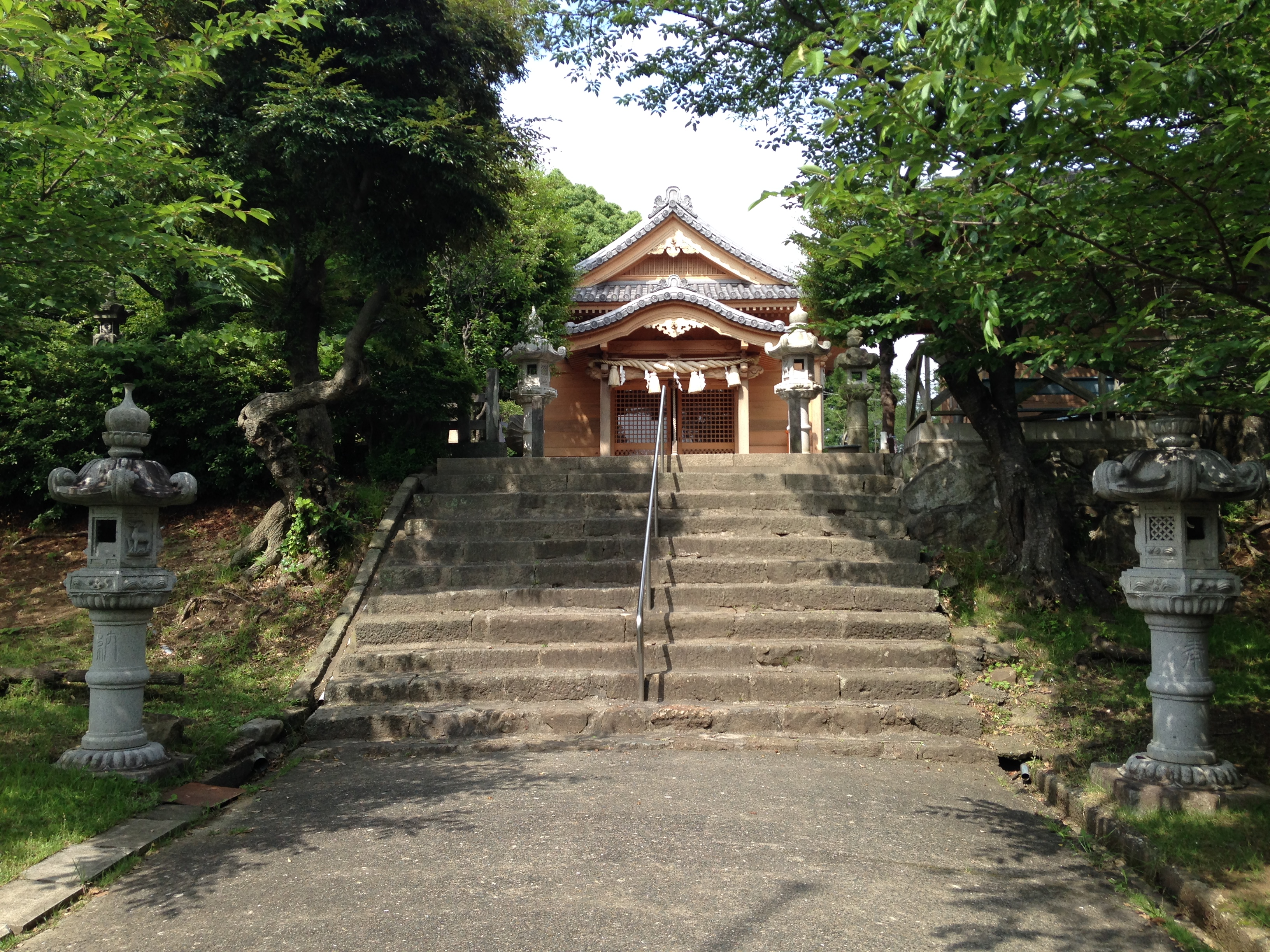 名島神社の拝殿と参道